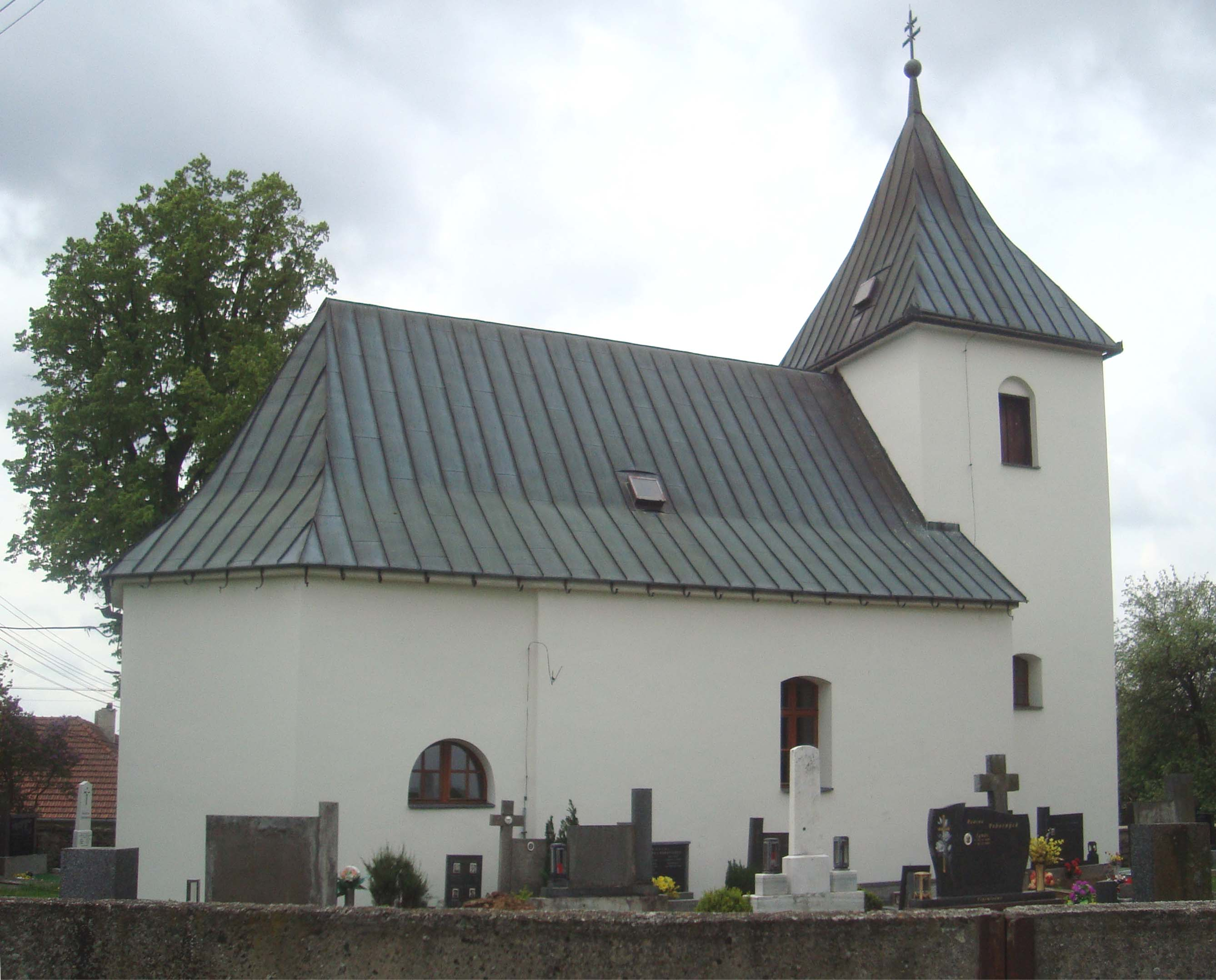 Košíkov kostel svatého Bartoloměje